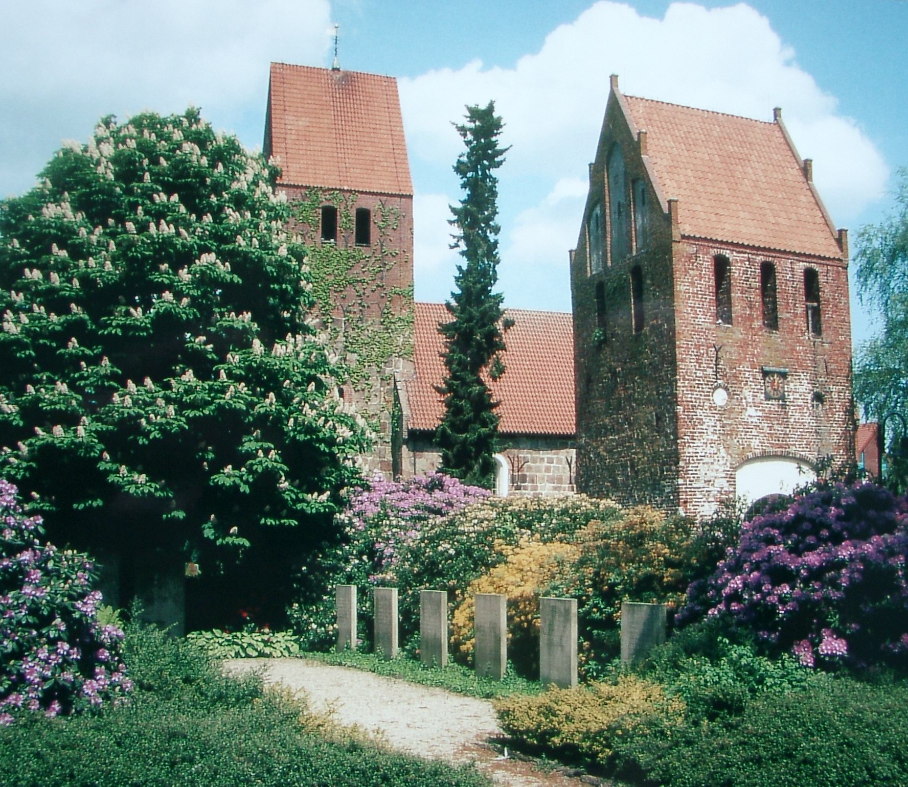 Die Wiefelsteder St. Johannes-Kirche von der Kirchstraße aus gesehen. Vorne der Glockenturm, weiter hinten die Kirche mit Kirchturm (ehemaligem Glockenturm - 2004). Im Jahre 2006 wurde der Glockenturm saniert. Dies ist auf dem Bild noch nicht zu erkennen.